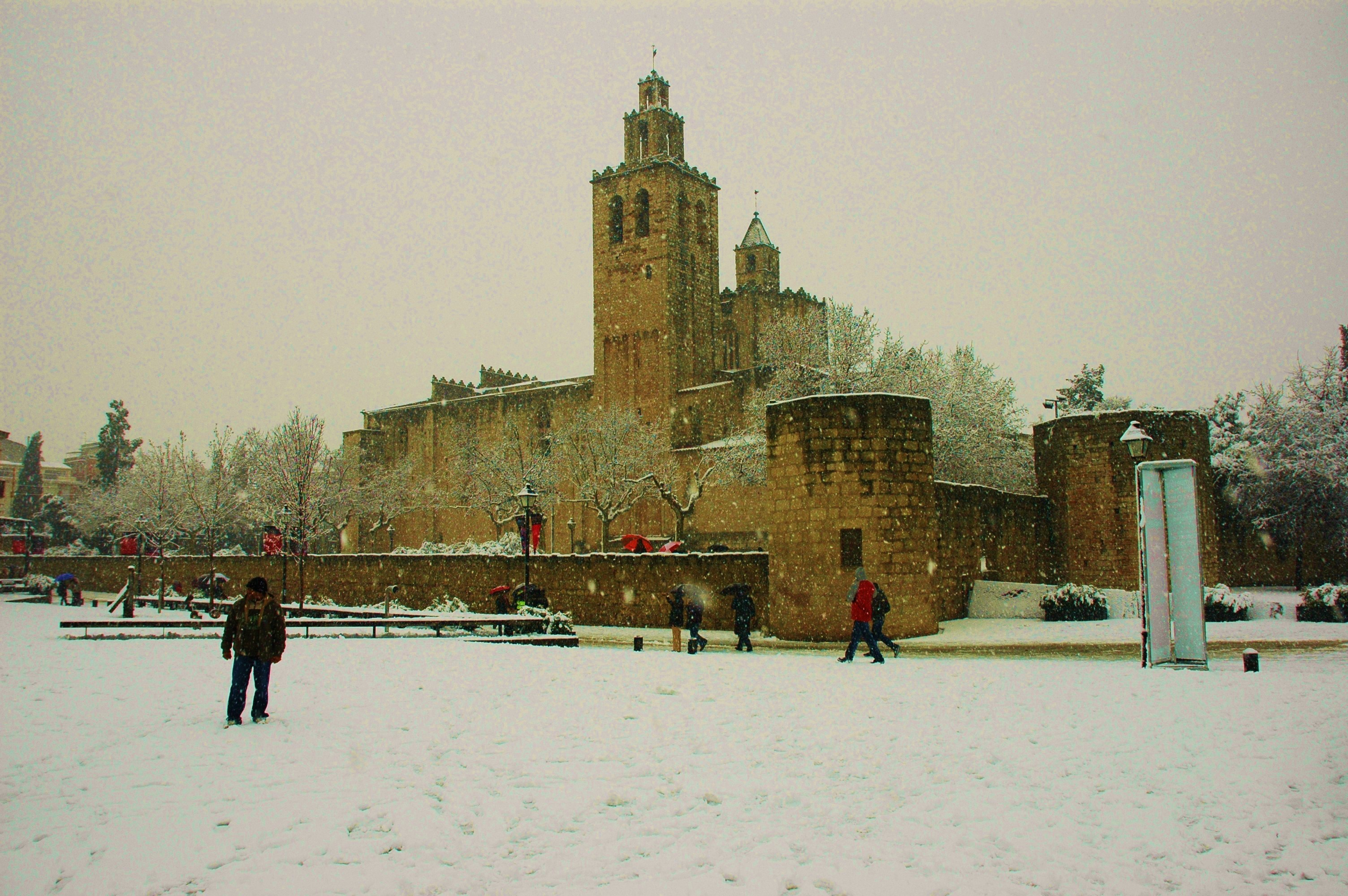 Monestir de Sant Cugat nevat